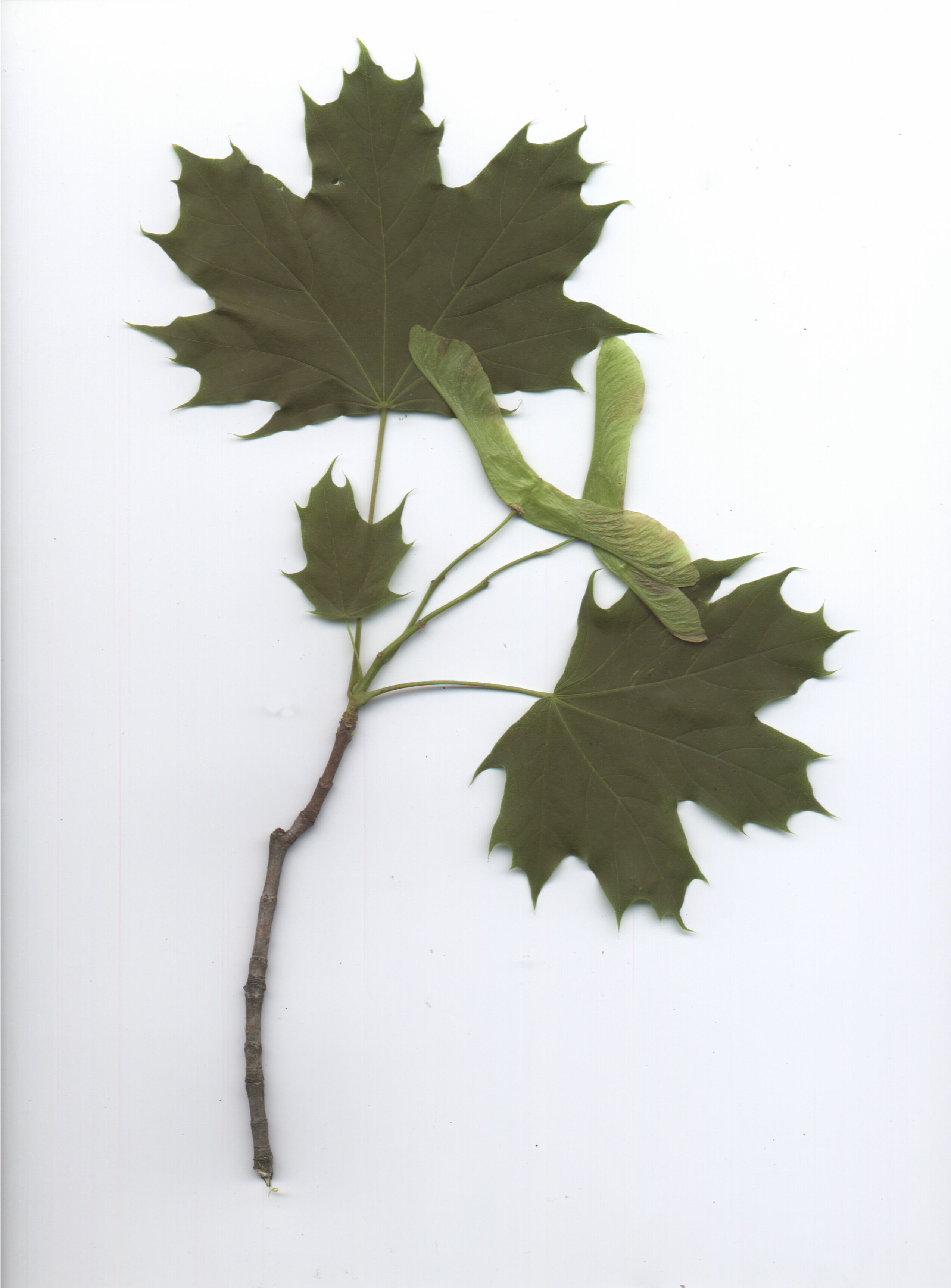 Ahornzweig mit Samen, Acer platanoides twig